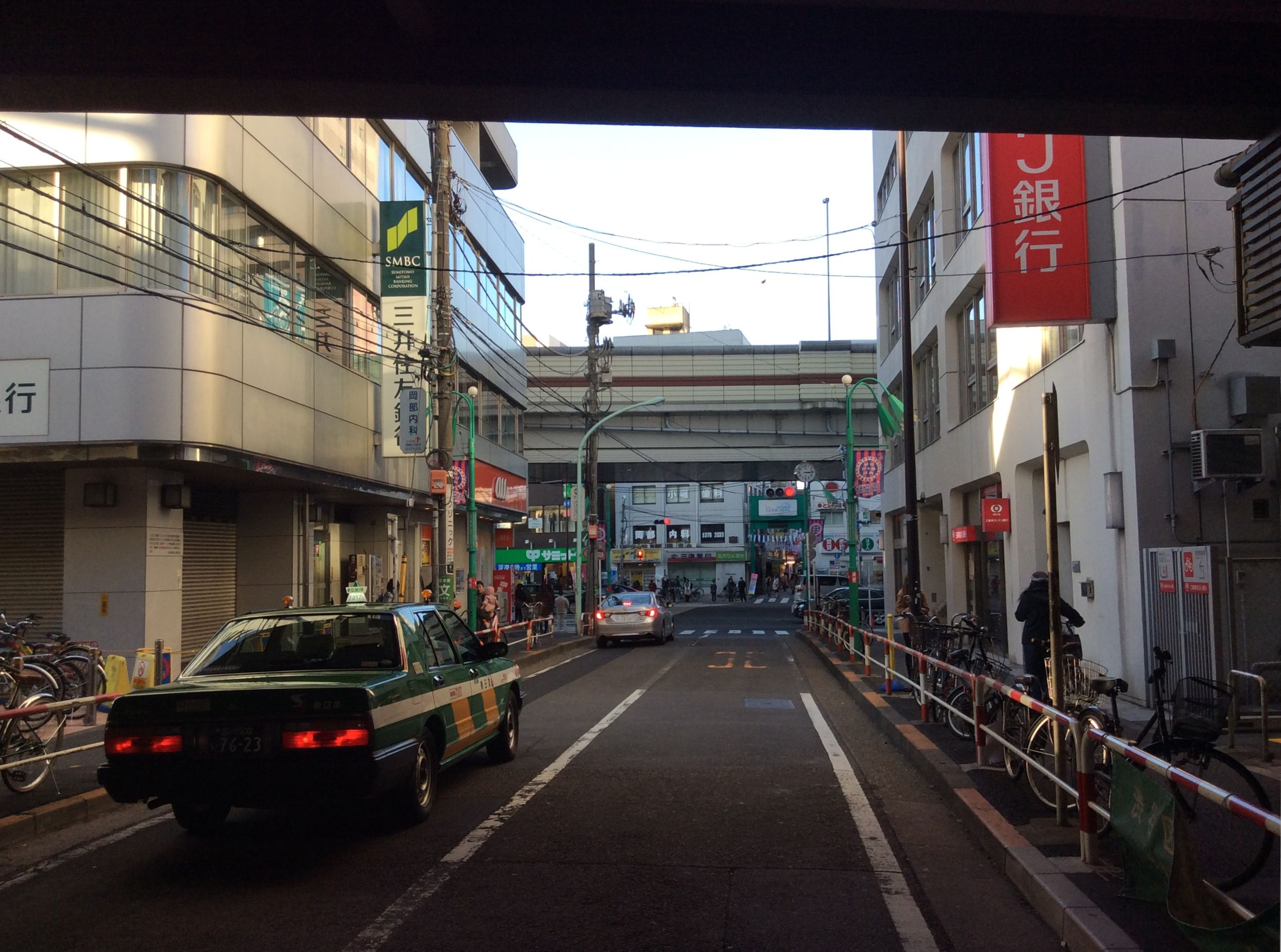 2014年（平成26年）12月7日、笹塚駅高架下、至甲州街道、笹塚二丁目